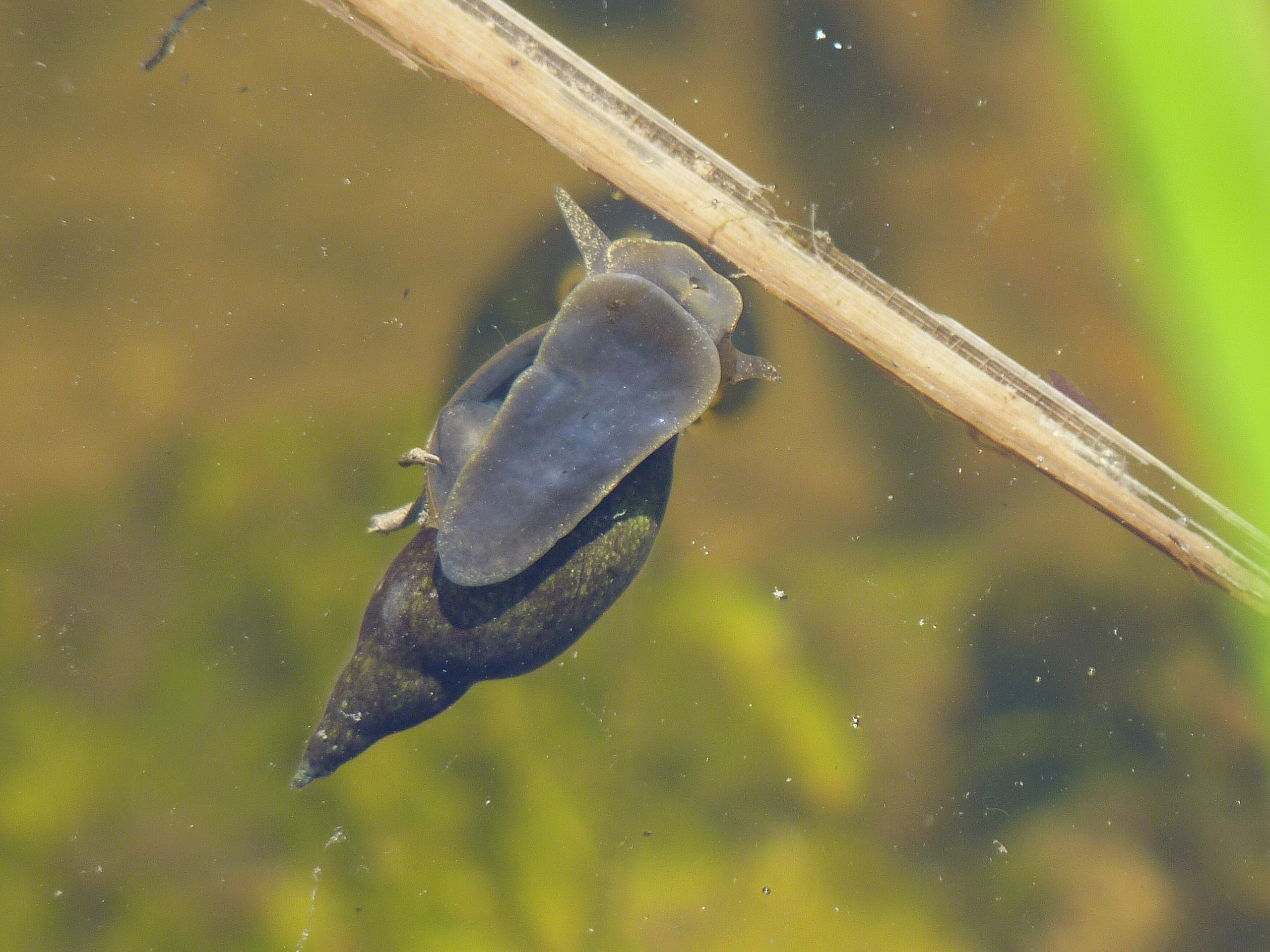 Spitzschlammschnecke (Lymnaea stagnalis)